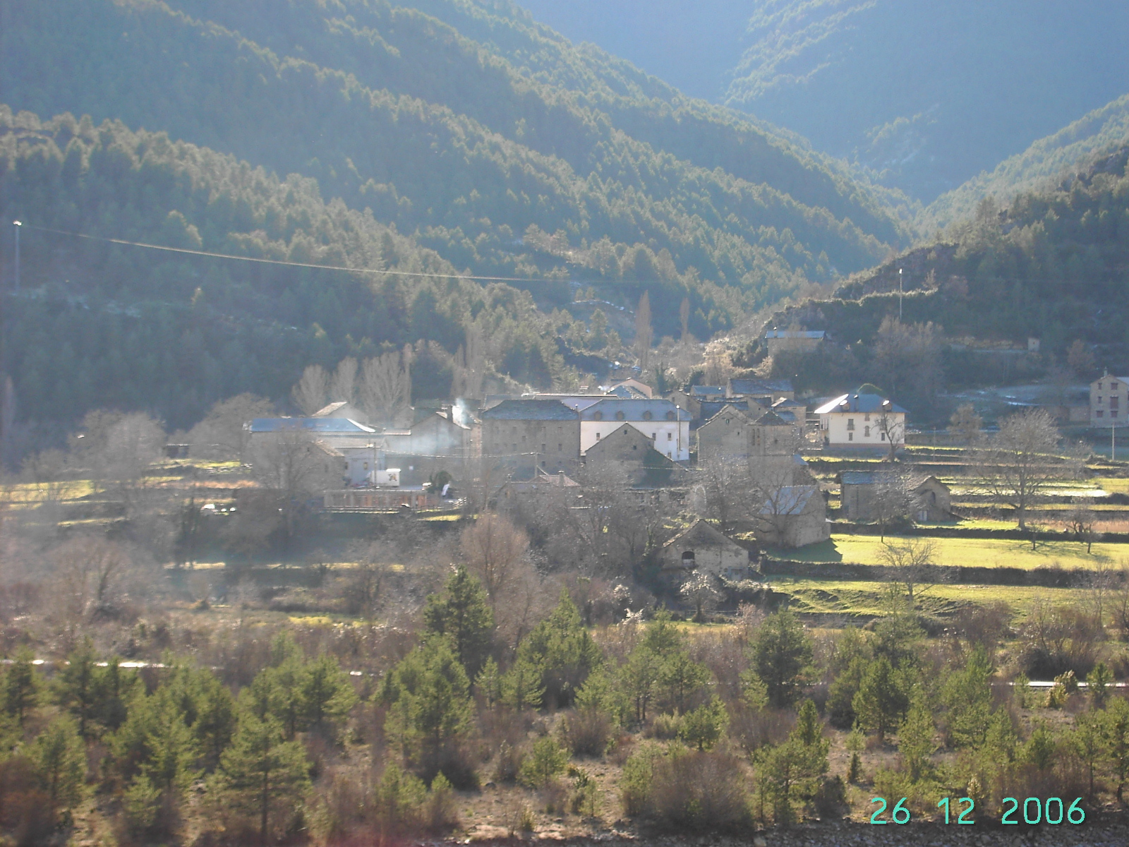 Ligüerre de Ara, en el valle del Ara, pertenece al municipio de Fiscal (Huesca).